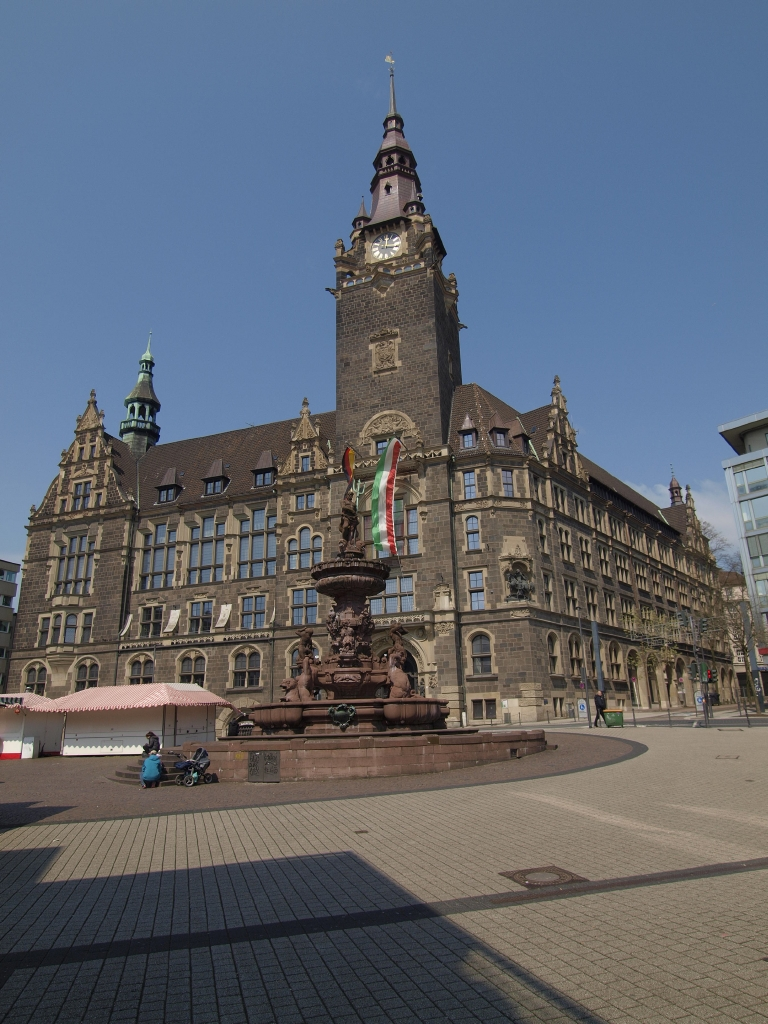 ehem. Neues Rathaus Elberfeld Neumarktstraße 10 Wuppertal Quartier Elberfeld-Mitte. Jetzt Verwaltungshaus Elberfeld der Stadt Wuppertal. Denkmalnr. D 209 This is a photograph of an architectural monument. 209